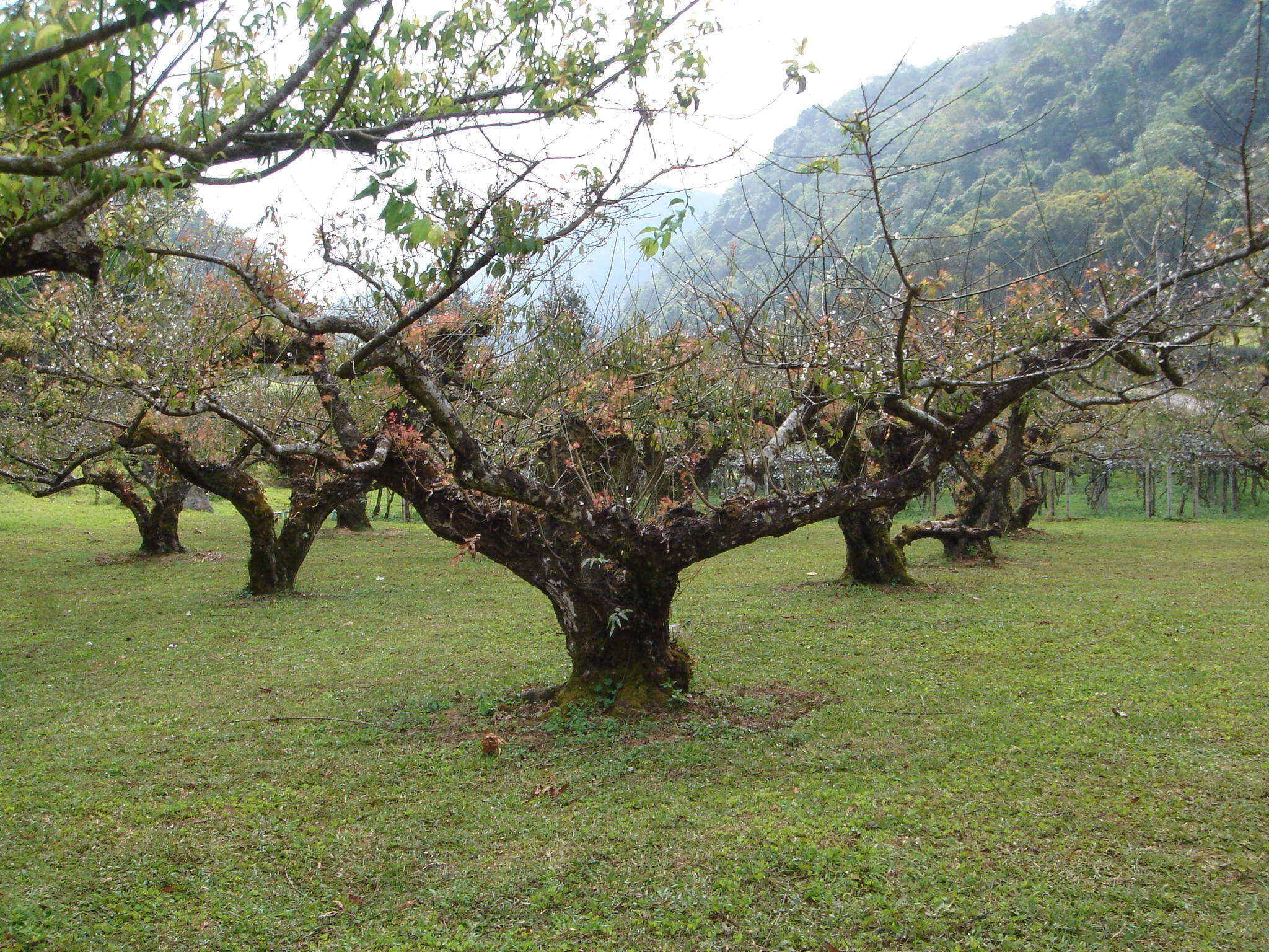 Ang Khang Royal Agricultural Station